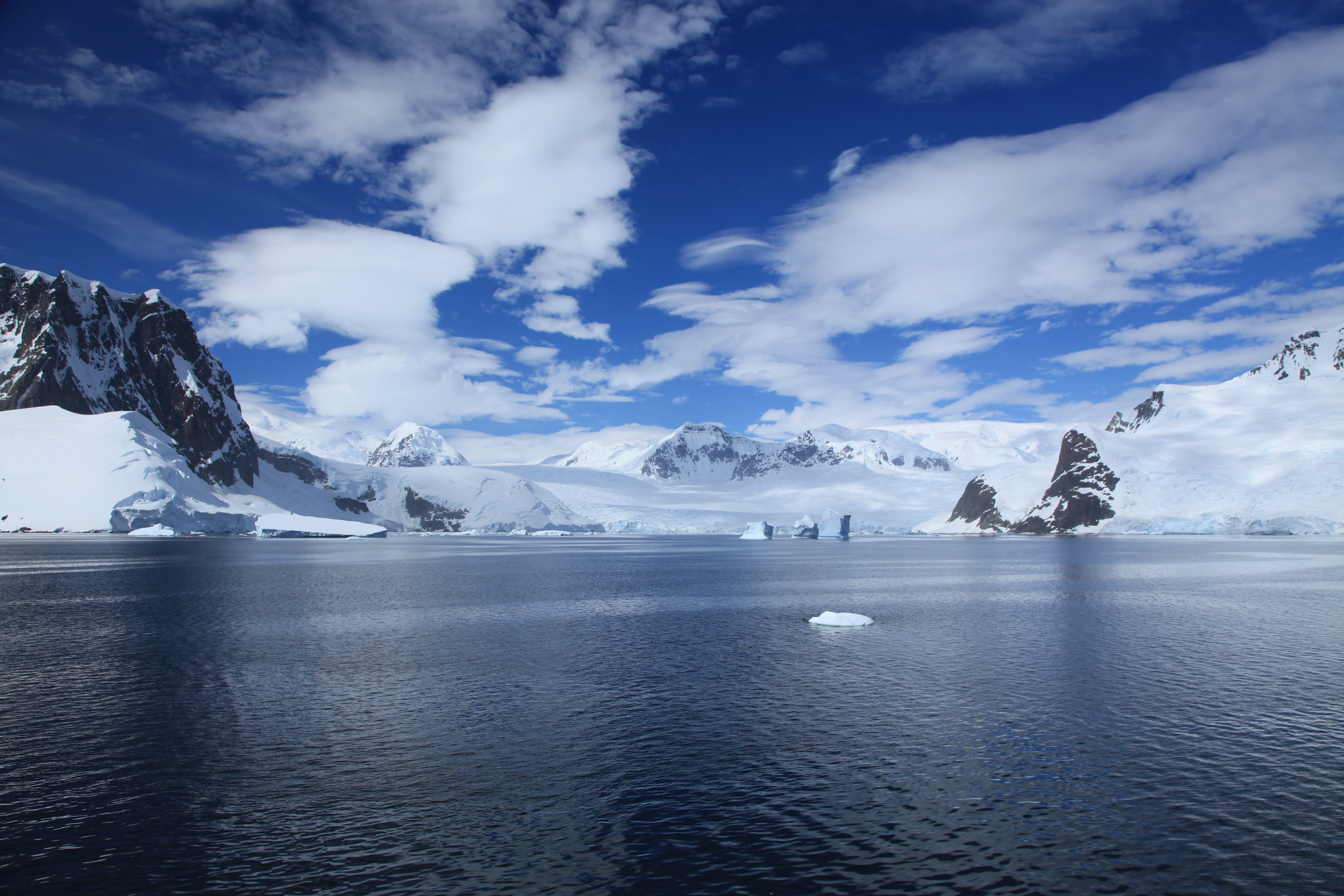 Penola Strait, Antarctica